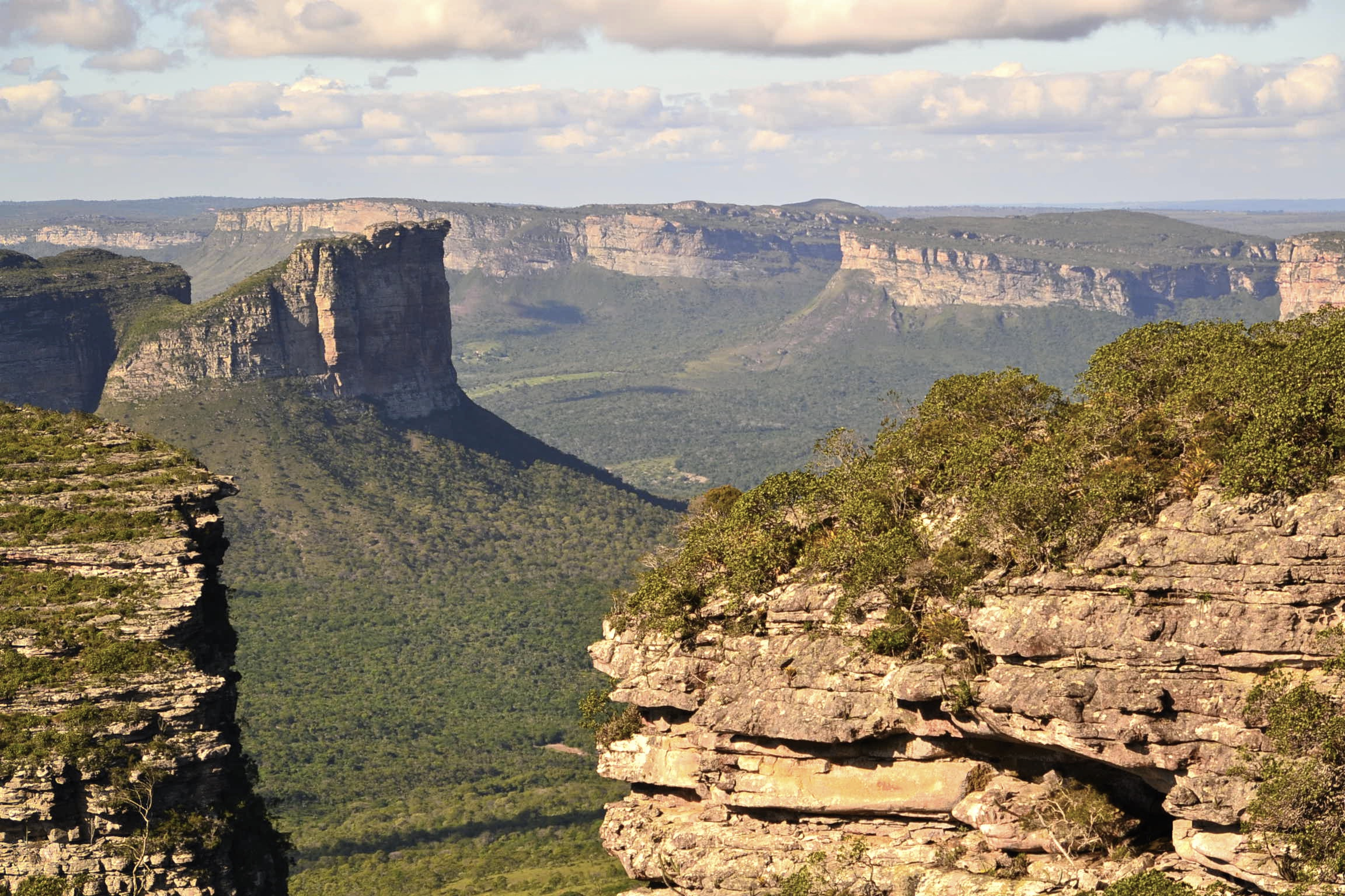 Vista do alto do Morro do Pai Inácio